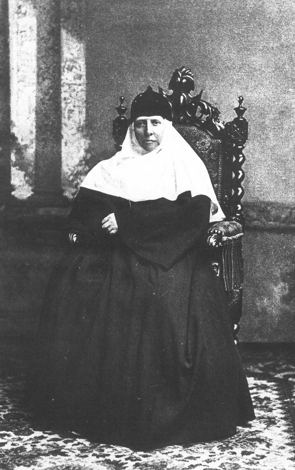 Великая княгиня Александра Петровна